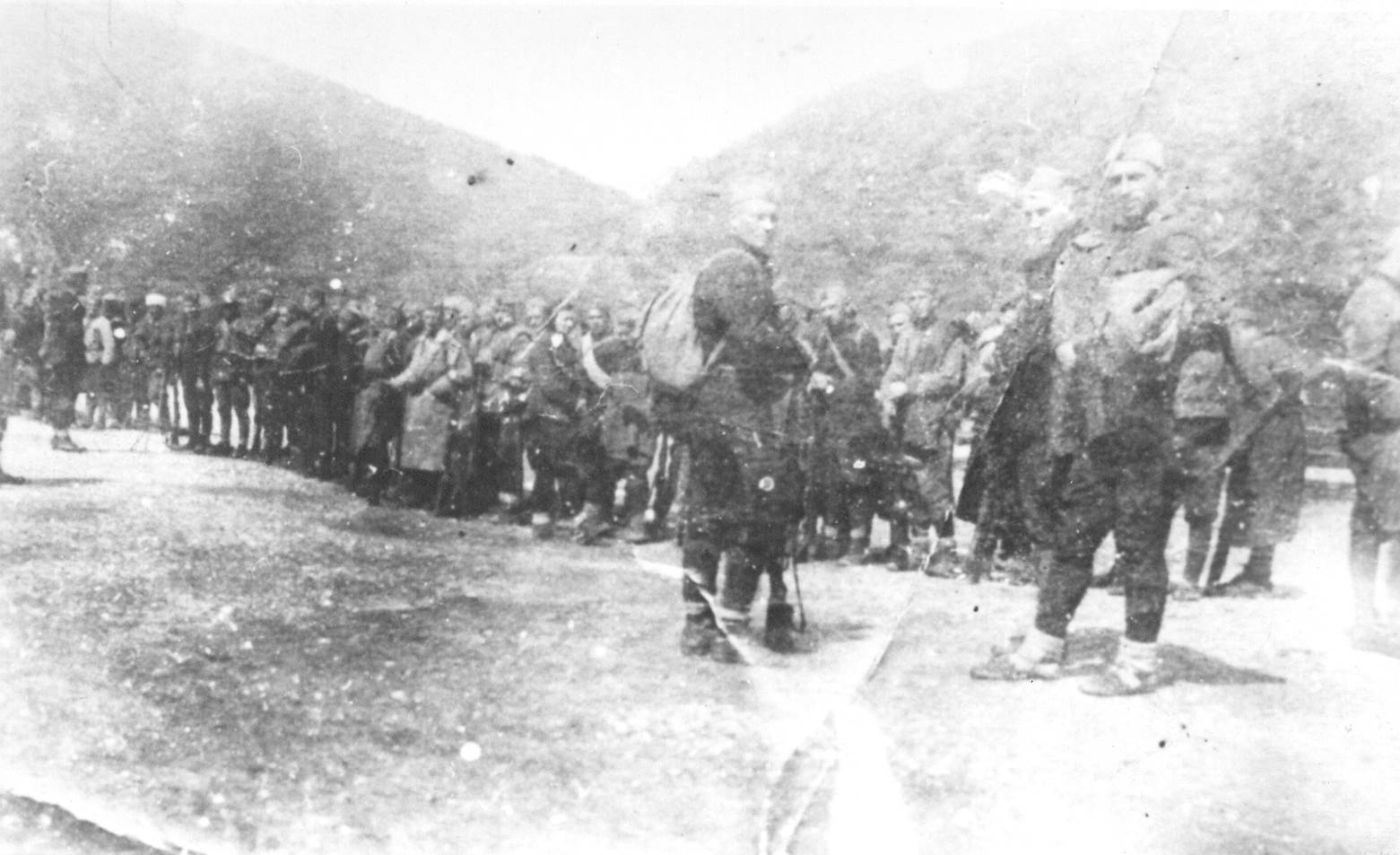 Partigiani del IV battaglione (Kraljevo) serbo della Prima brigata proletaria il 1 maggio 1942